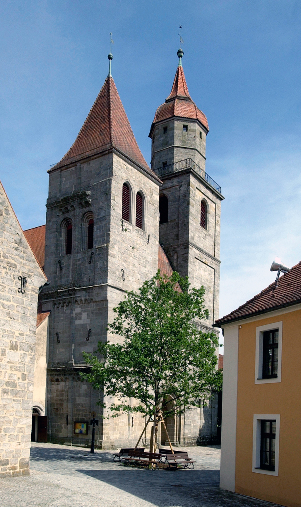 Stiftskirche in Feuchtwangen Feuchtwangen Erlaubnis wurde von der Tourist Information erteilt